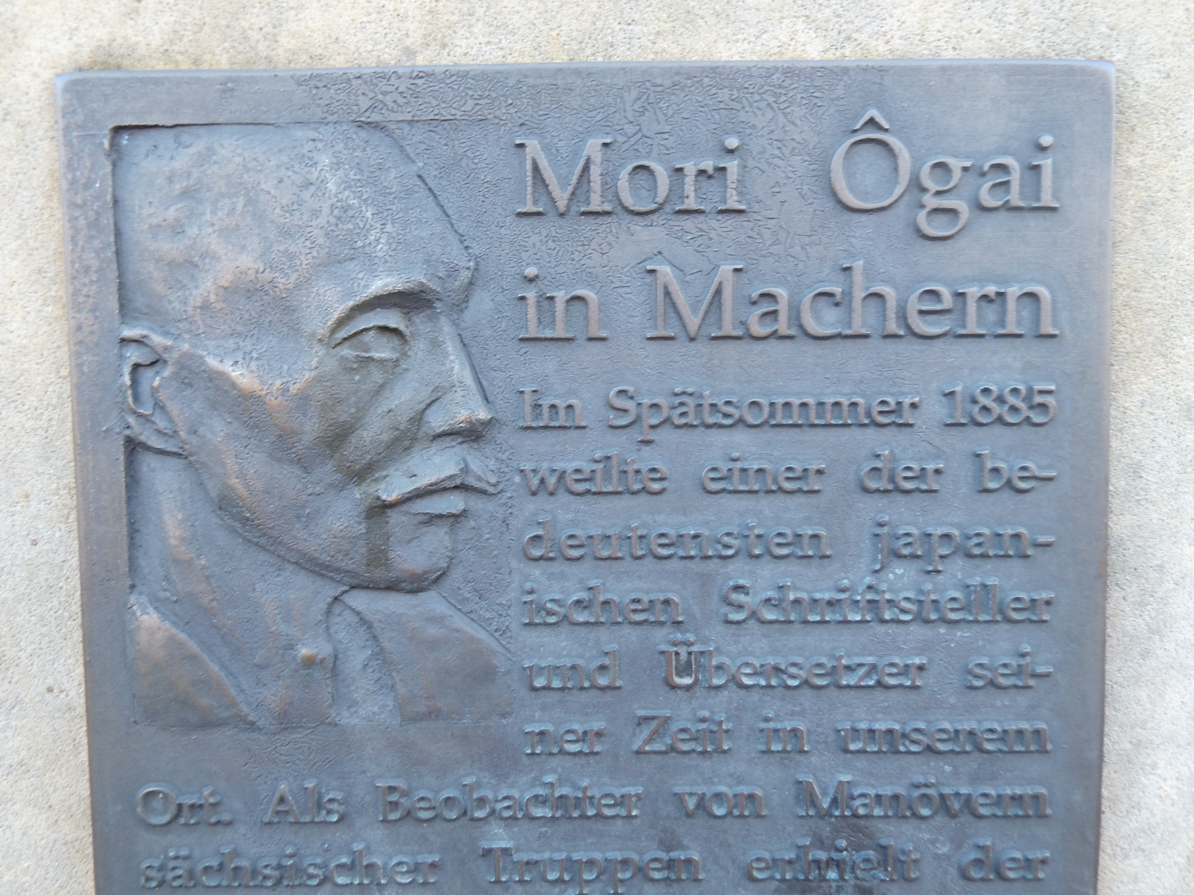 Gedenktafel in Machern für Mori Ōgai (oberer Teil)